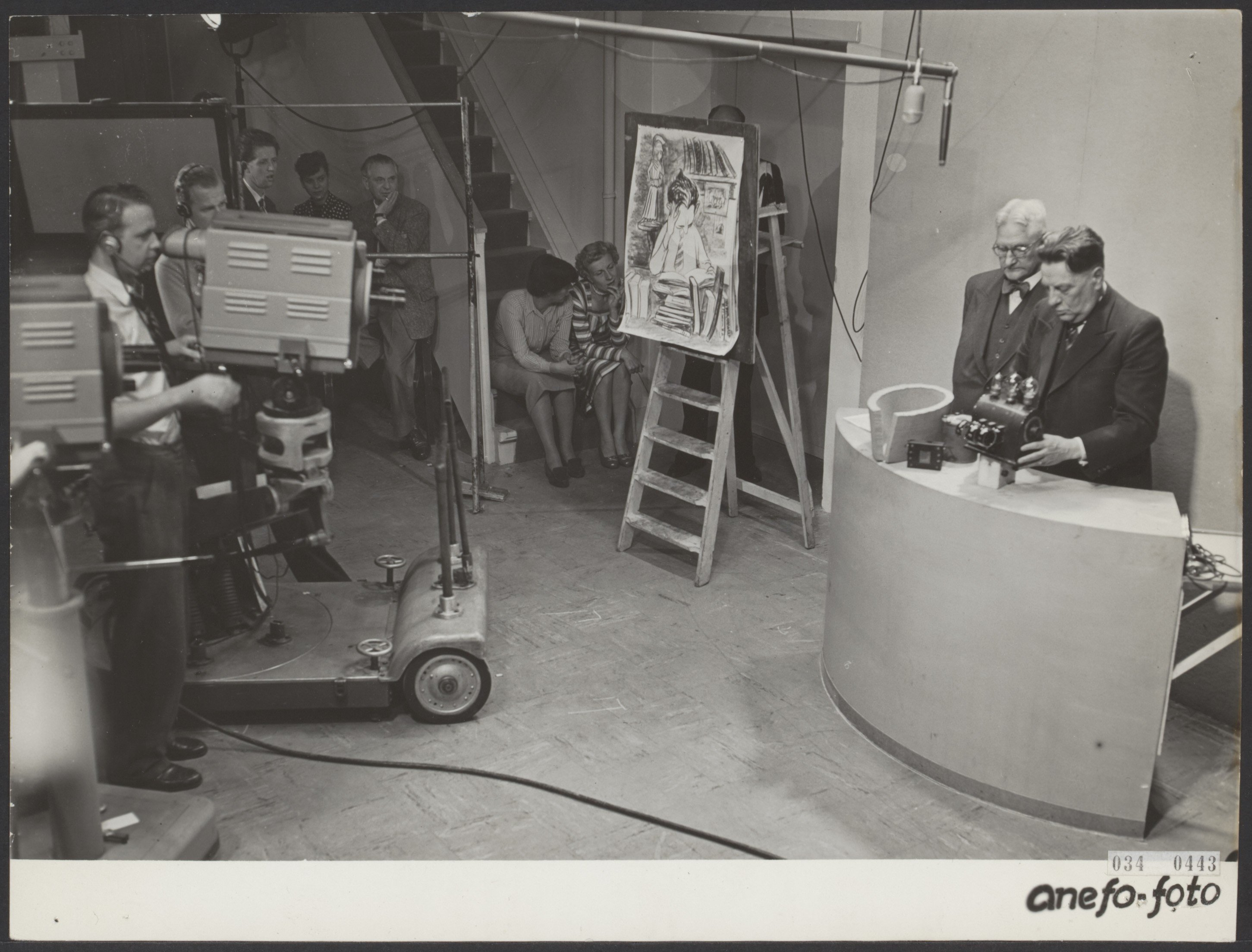 Collectie / Archief : Fotocollectie Elsevier Reportage / Serie : [ onbekend ] Beschrijving : Eerste AVRO televisie-uitzending. Het eerste programma, getiteld Televizier werd geopend door de voorzitter van de AVRO, G. de Clercq, en de directeur van de AVRO, W. Vogt, met een praatje over het ontstaan van de AVRO Datum : 5 oktober 1951 Locatie : Bussum Trefwoorden : cameras, omroepen, programmas, studios, televisies Persoonsnaam : Clercq G. De, Vogt, Willem Instellingsnaam : Televizier Fotograaf : Pot, Harry / Anefo Auteursrechthebbende : Nationaal Archief Materiaalsoort : Foto (zwart/wit) Nummer archiefinventaris : bekijk toegang 2.24.05.02 Bestanddeelnummer : 034-0443